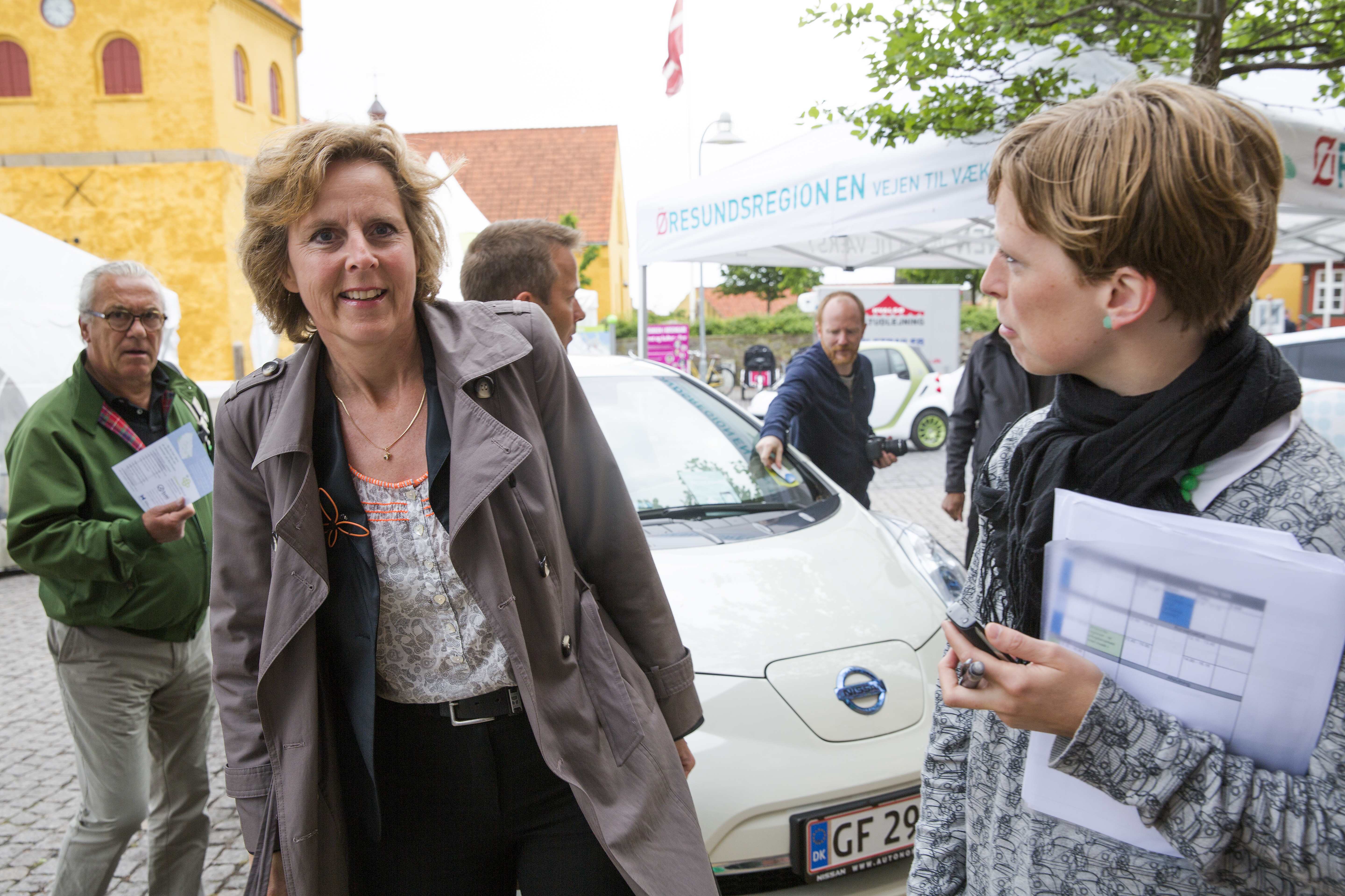 EU’s klimakommissær Connie Hedegaard på väg in till Region Hovedstadens elbilsseminarium i Øresundshuset på Folkemødet i Allinge, Bornholm den 14 juni 2013, bakom henne skymtar en Nissan Leaf elbil. Temat var: hvordan får vi gang i hjulene? Debat om EU’s og Danmarks rolle i omstillingen til elbiler. Region Hovestadens mål är att det ska finnas 12.000 elbilar i regionen år 2015. Folkemødet arrangeras för tredje året med rekordmånga deltagare. Det danska politikermötet skapades på idé av dåvarande inrikesministern Bertel Haarder efter ett besök på Gotland under den svenska politikerveckan där - Almedalsveckan. Foto: News Øresund – Johan Wessman. © News Øresund. Bilden får fritt publiceras under förutsättning att källa anges. Bilden får ej manipuleras. (The picture can be used freely under the prerequisite that the source is given. Photo manipulation is not allowed.) Originalfil tillhandahålles gratis, kontakta: News Øresund, Malmö, Sweden. News Øresund är en oberoende regional nyhetsbyrå som ingår i projektet Øresund Media Platform som drivs av Øresundsinstituttet i partnerskap med Lunds universitet och Roskilde Universitet och med delfinansiering från EU (Interreg IV A Öresund) och 14 regionala, icke kommersiella aktörer.